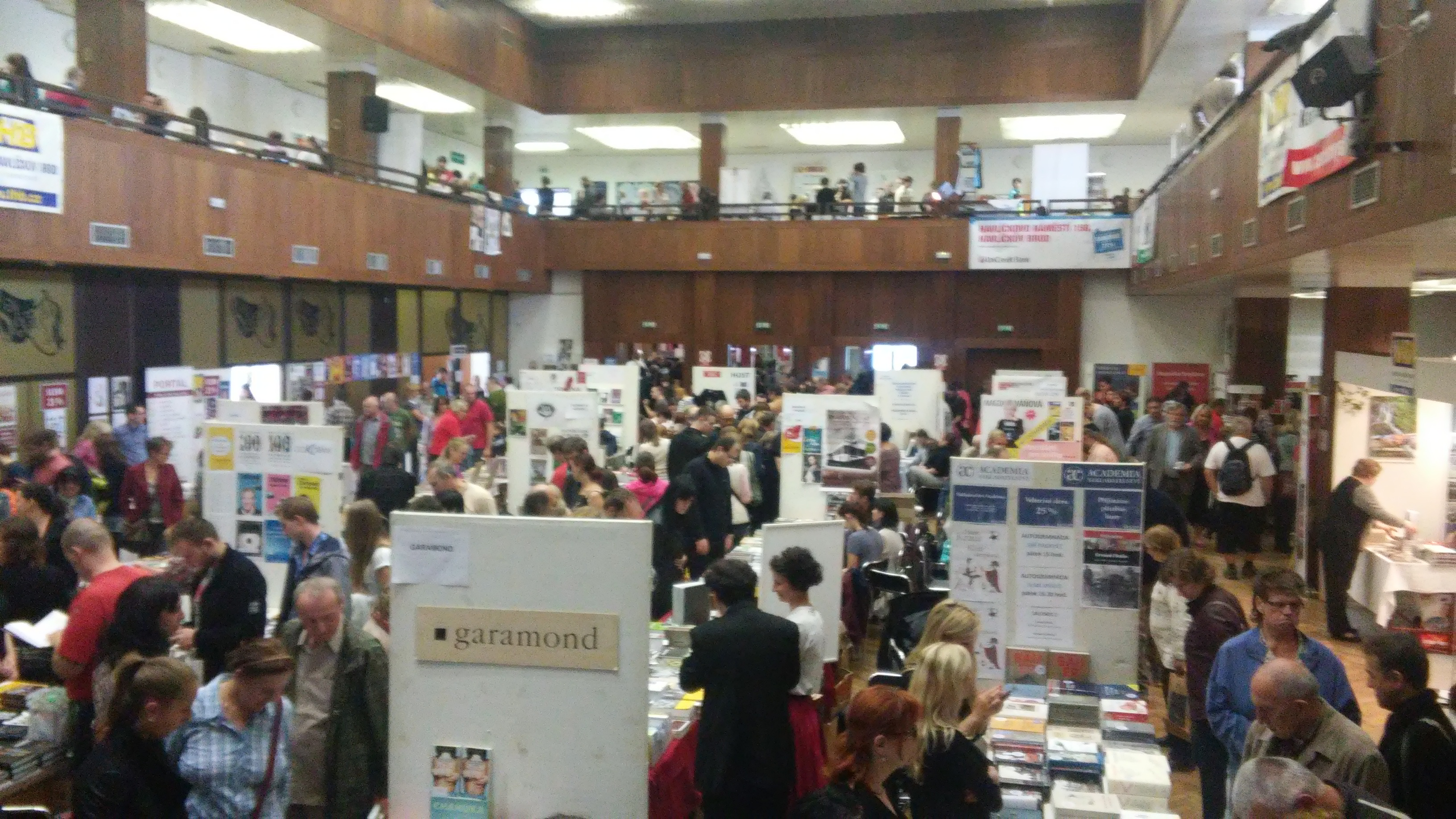 Hlavní sál veletru